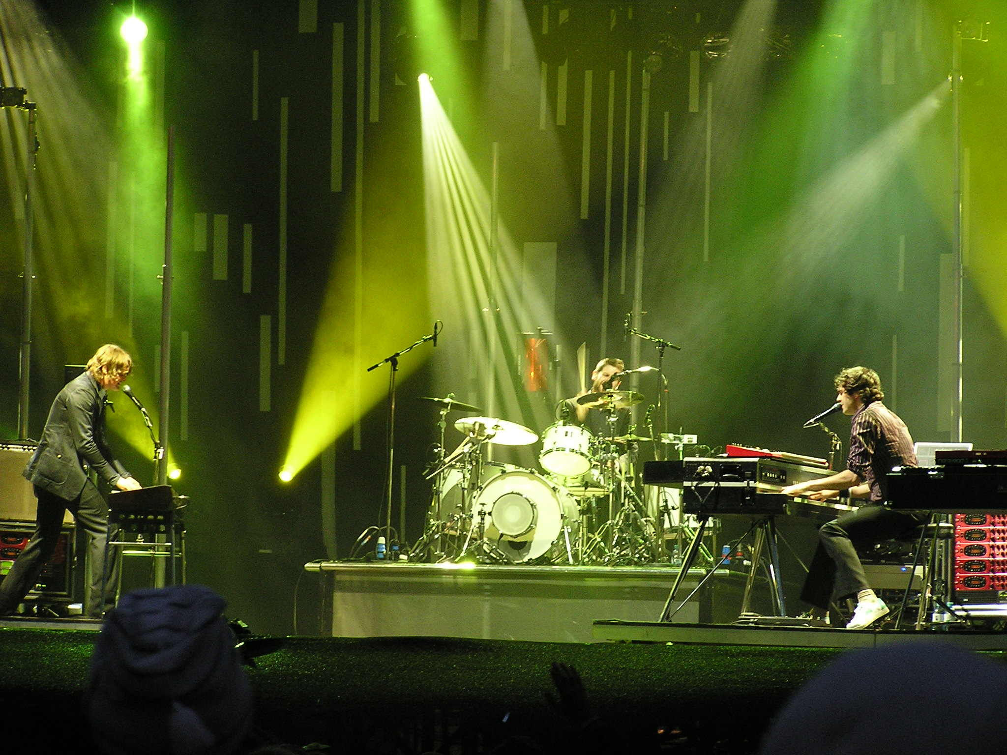 Keane